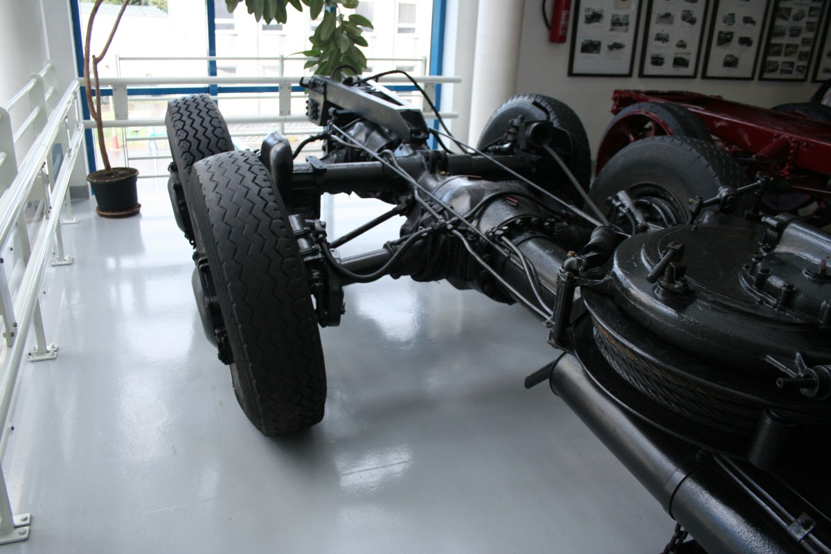 Podwozie samochodu ciężarowego. Muzeum Tatry. Autor- Marek Czerwiński